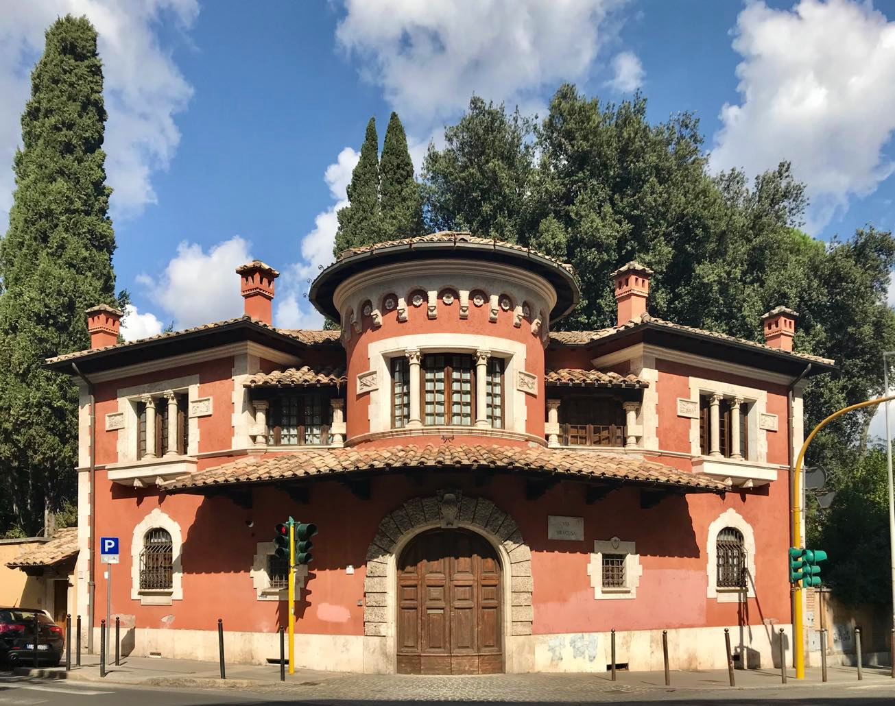 Il Villino Rosso presso Villa Torlonia a Roma, sede dell'Accademia dei XL